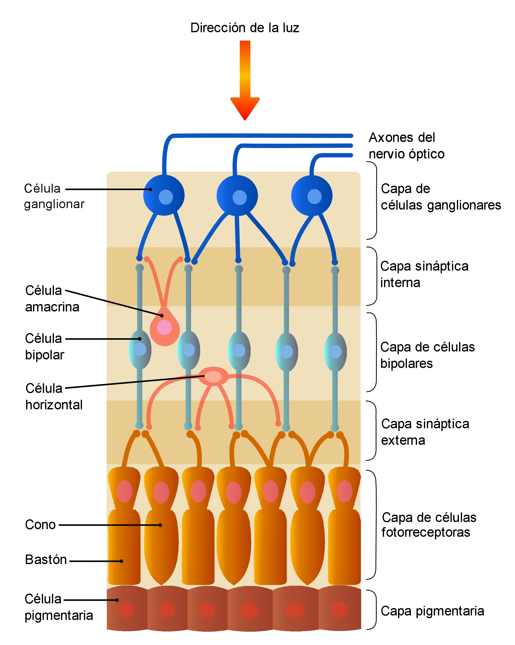 Esquema en el que se muestra de forma simplicada las diferentes capas que forman la retina humana.